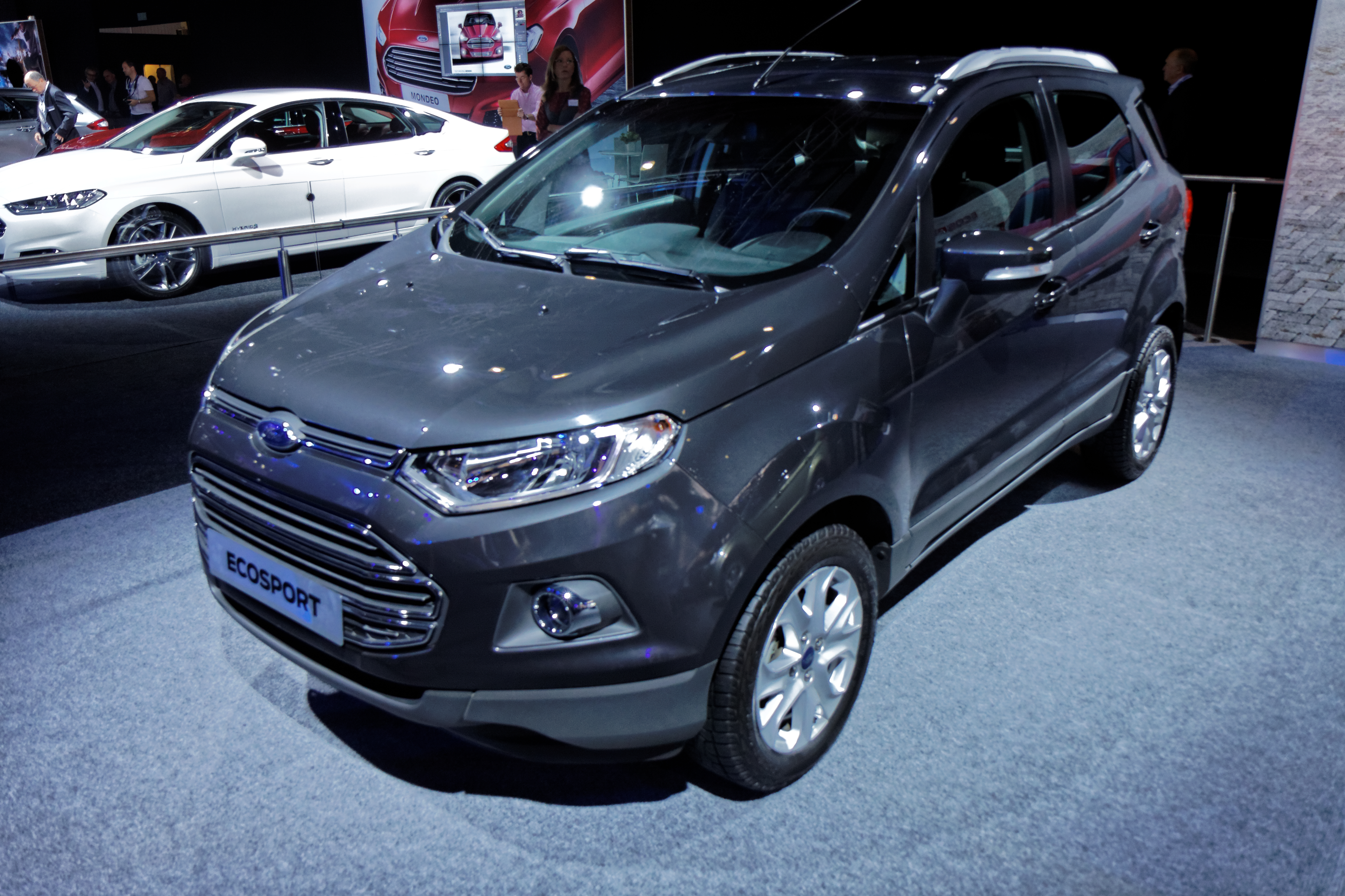 Une Ford Ecosport présentée lors du Mondial de l'Automobile de Paris 2012.